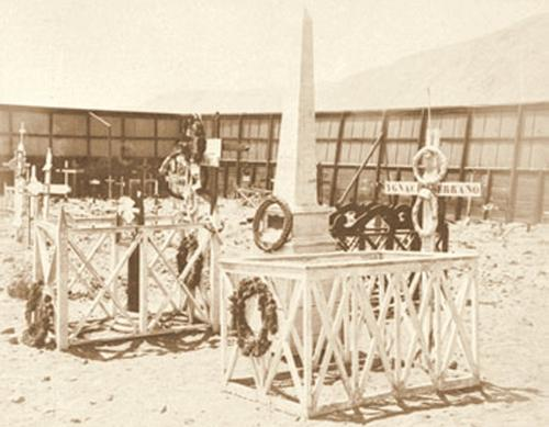 Tumbas de Arturo Prat e Ignacio Serrano en Iquique